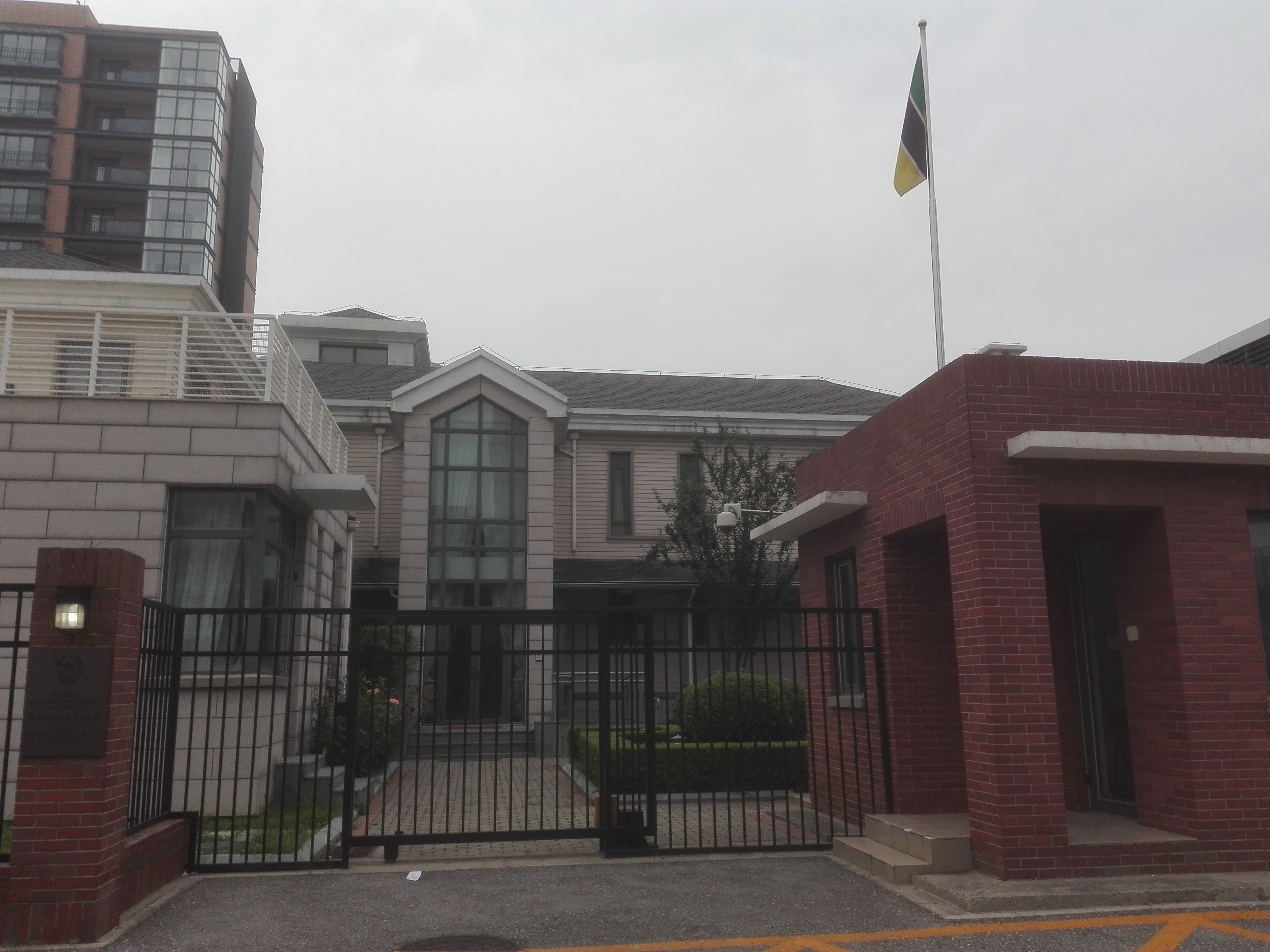 莫桑比克大使官邸